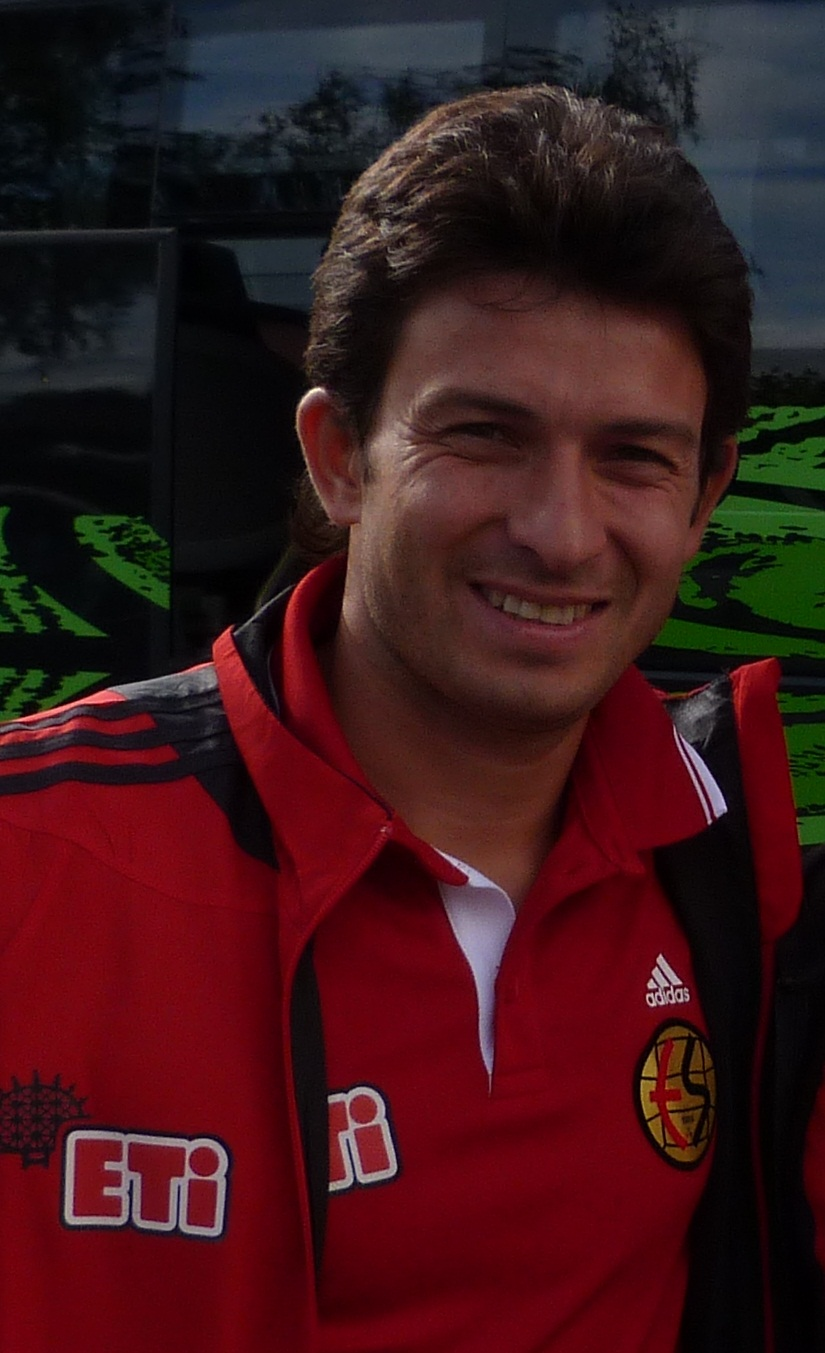 Bülent Ertuğrul